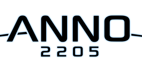 Logo des Commputerspiels Anno 2205